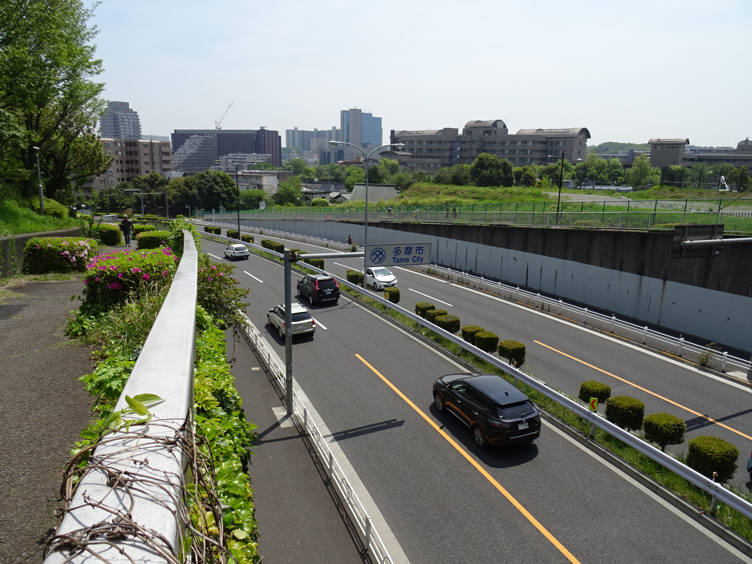 多摩市内を通る多摩ニュータウン通り（15/04/28撮影）